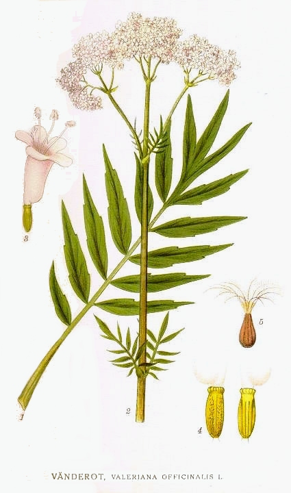 Original Descripion Vänderot, Valeriana officinalis L.